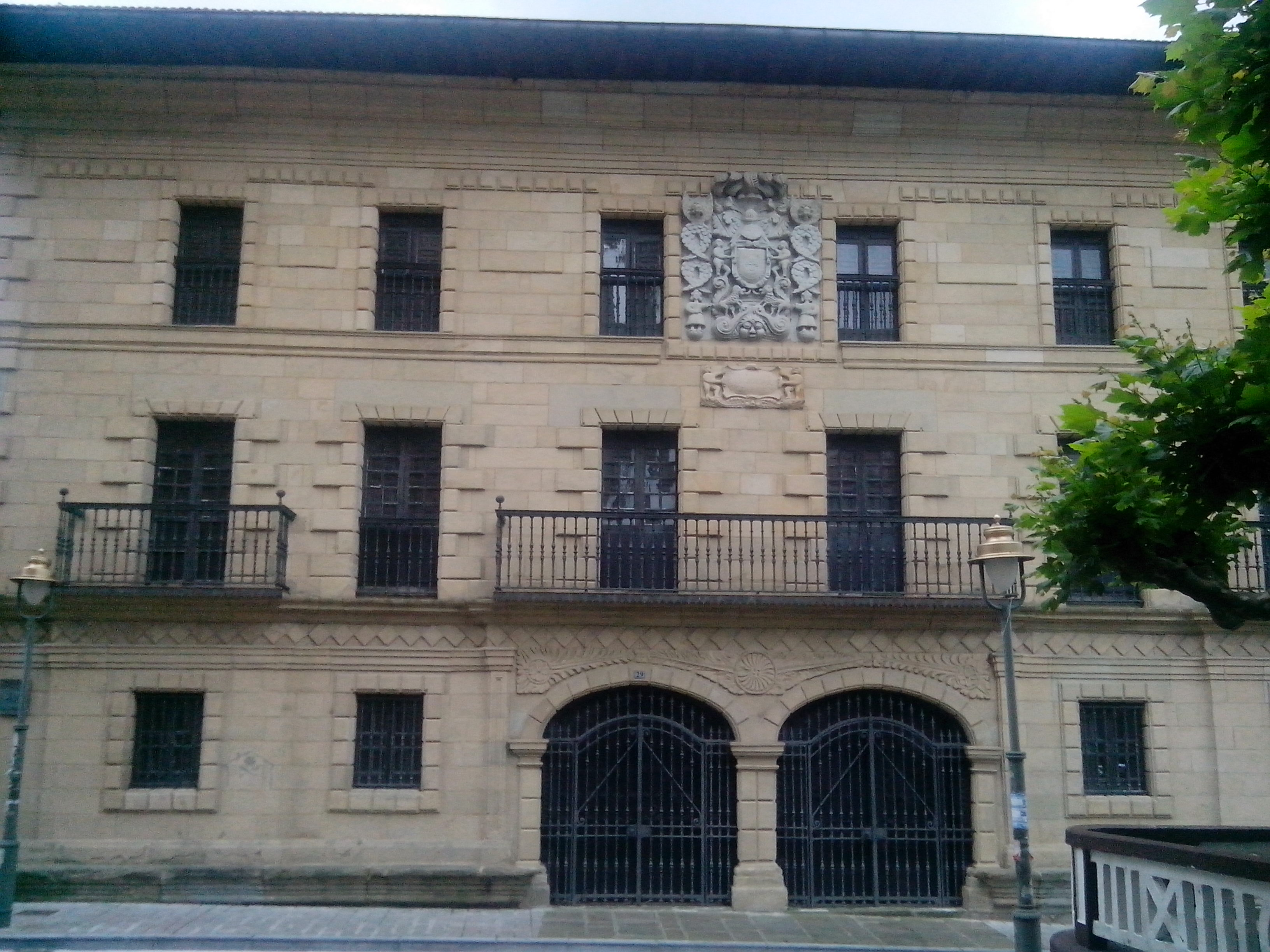 Saroe jauregia usurbilen